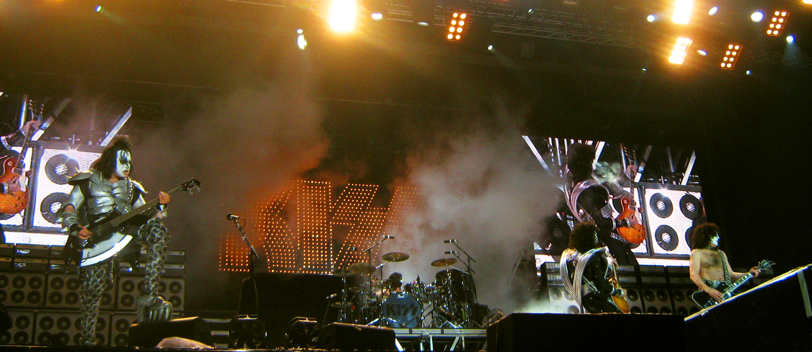 Kiss - Nijmegen 2008